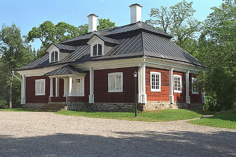 Herrgårdsanläggningen. Östra flygeln. Motiv: Engelsbergs bruk Nyckelord: Byggnadsminnen, Industriminnen, Riksintressen, Världsarv Kategori: Herrgård Herrgårdsanläggningen. Östra flygeln.